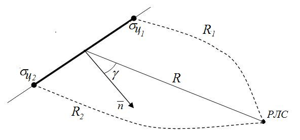 Двуточечная цель для расчёта ЭПР